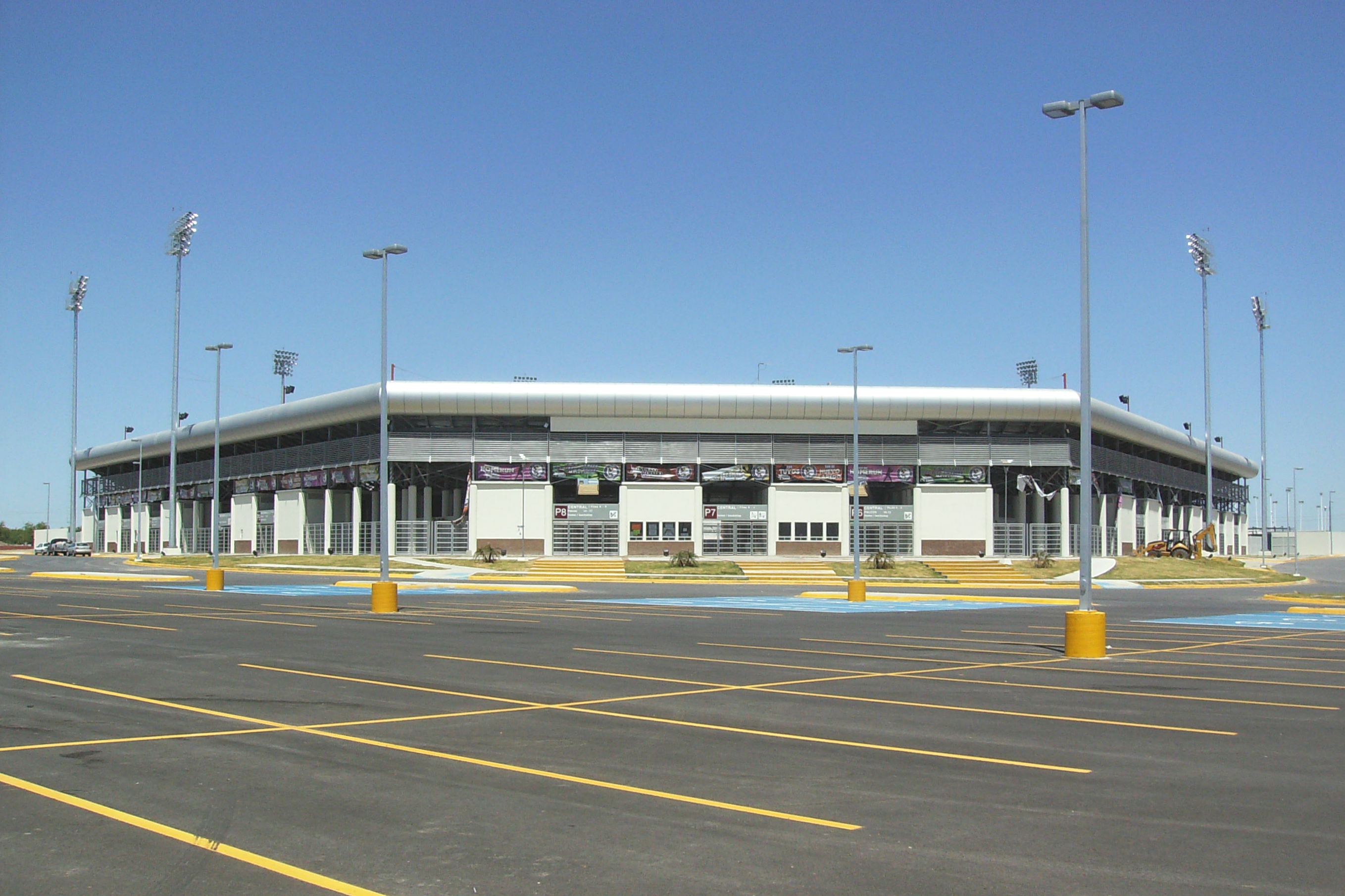 Ciudad Deportiva Entrance in Nuevo Laredo